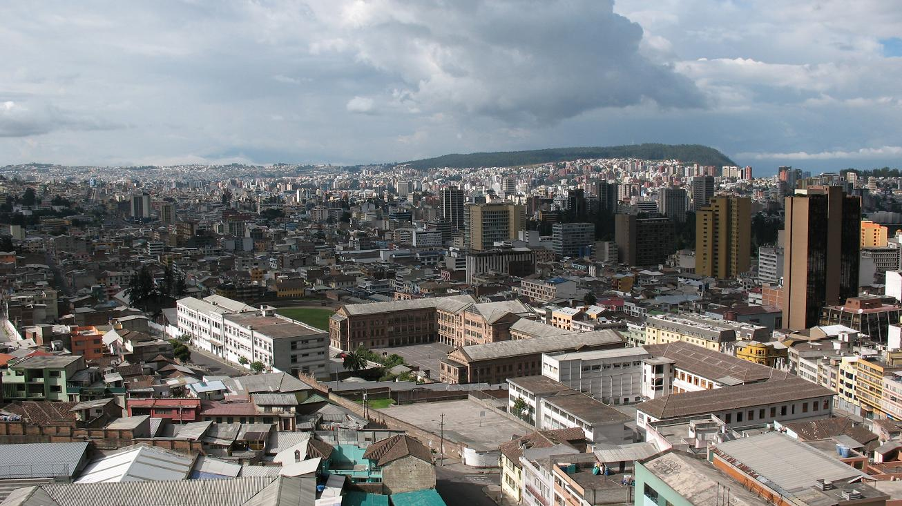 Vista de Quito (Ecuador) desde la Basilica.